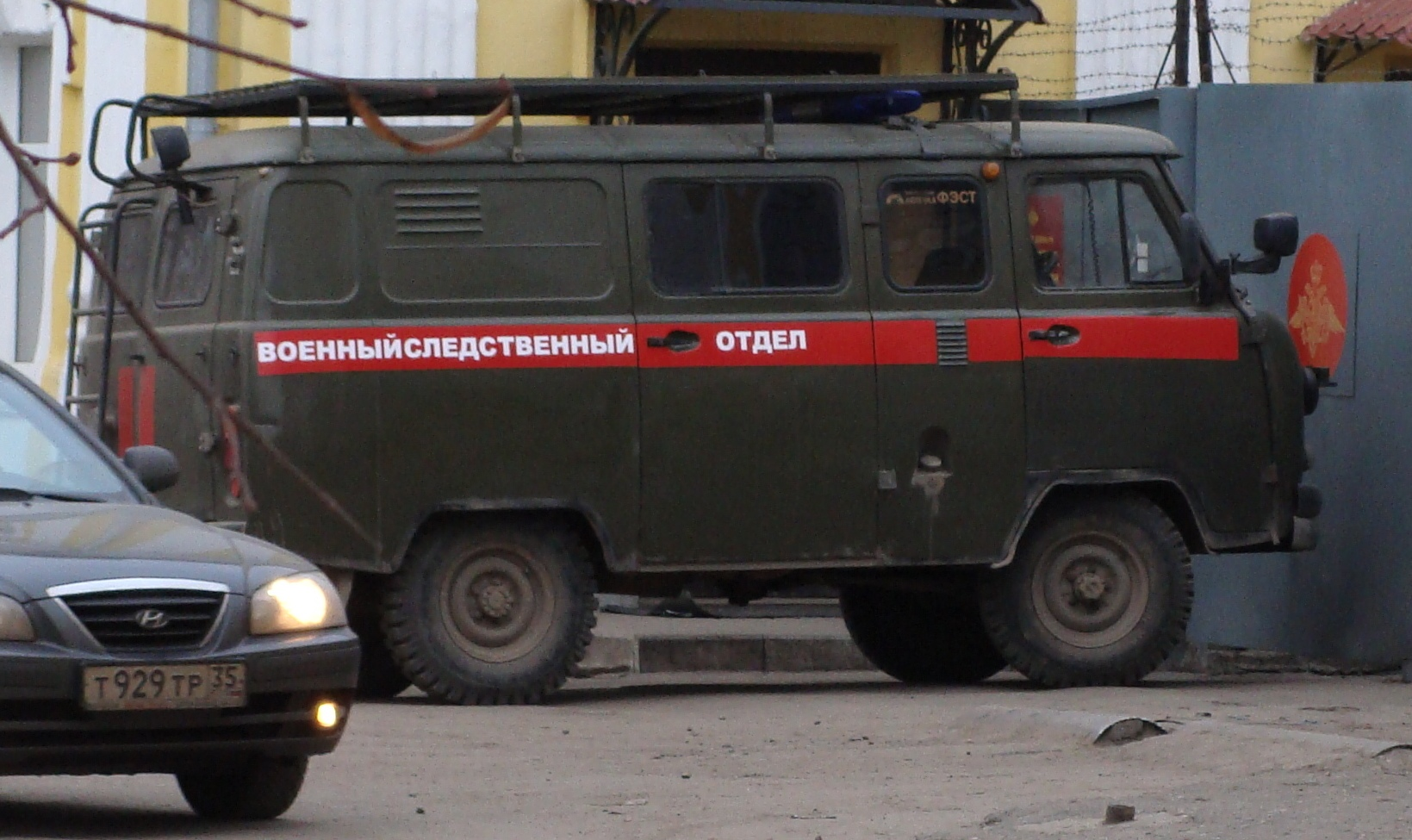 Автомобиль военного следственного отдела, Вологда.